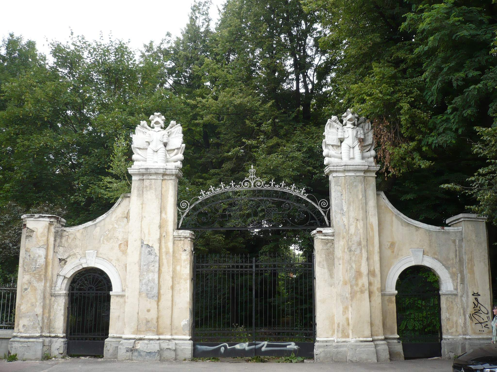 Stanisławów, brama do Pałacu, 2009 r.